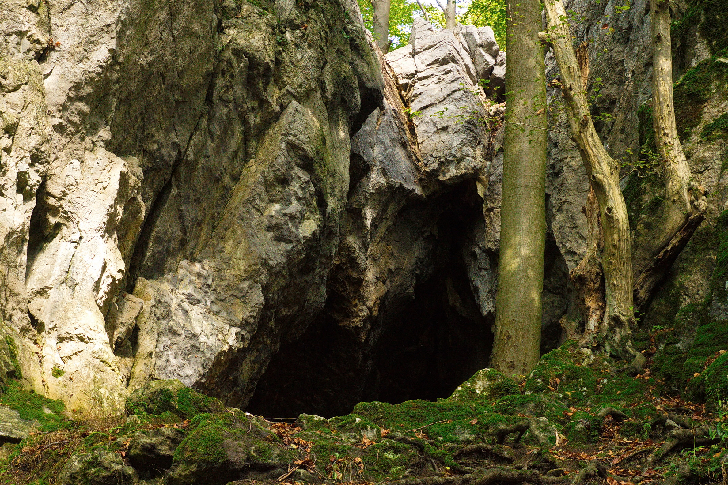 Eingag der Karhofhöhle